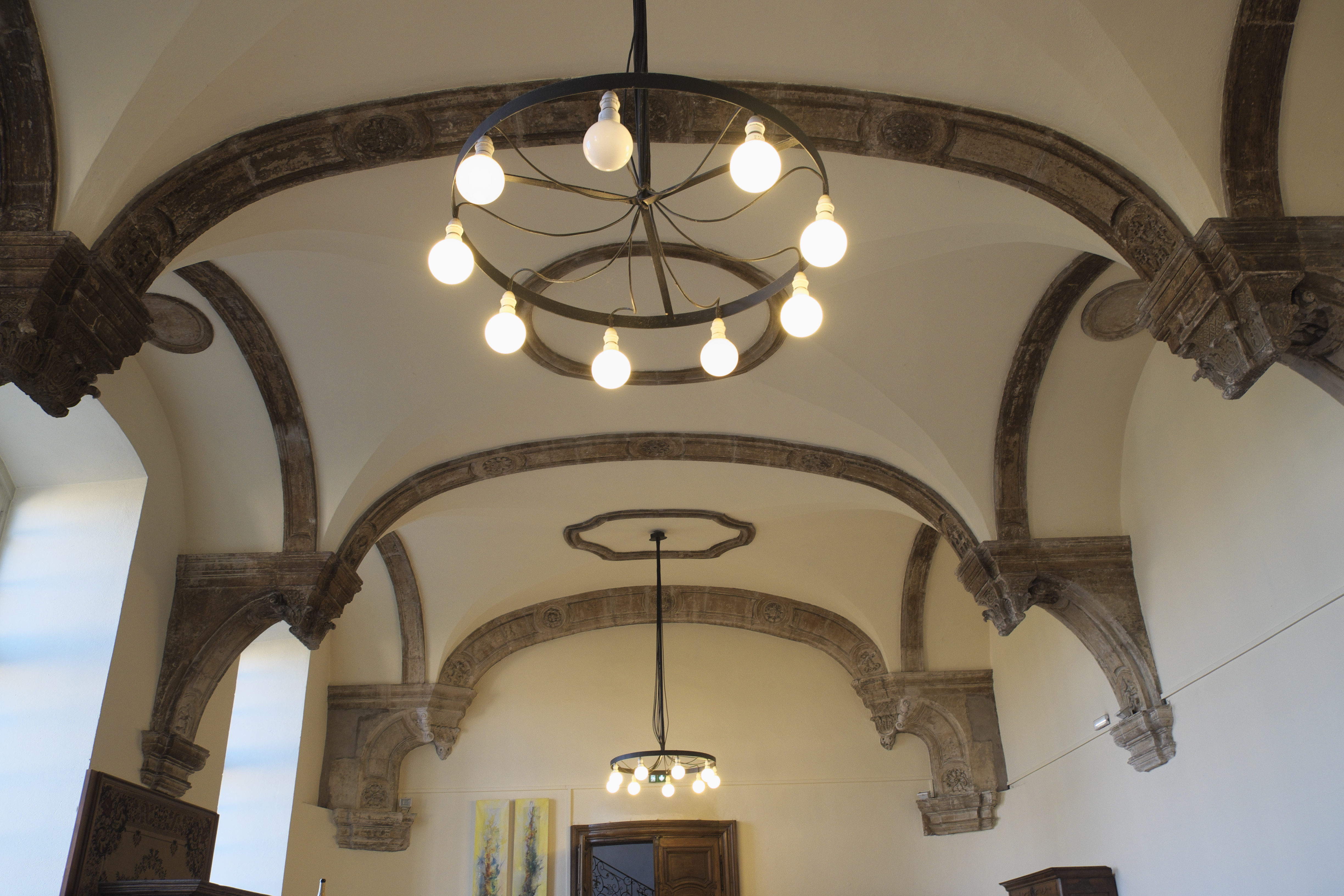 Ehemalige Prämonstratenserabtei in Pont-à-Mousson im Département Meurthe-et-Moselle (Region Grand Est/Frankreich), Speisesaal